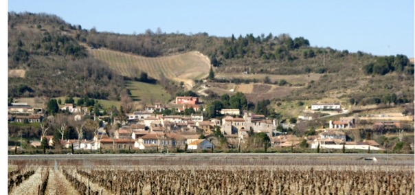 Vue générale du village de Cépie